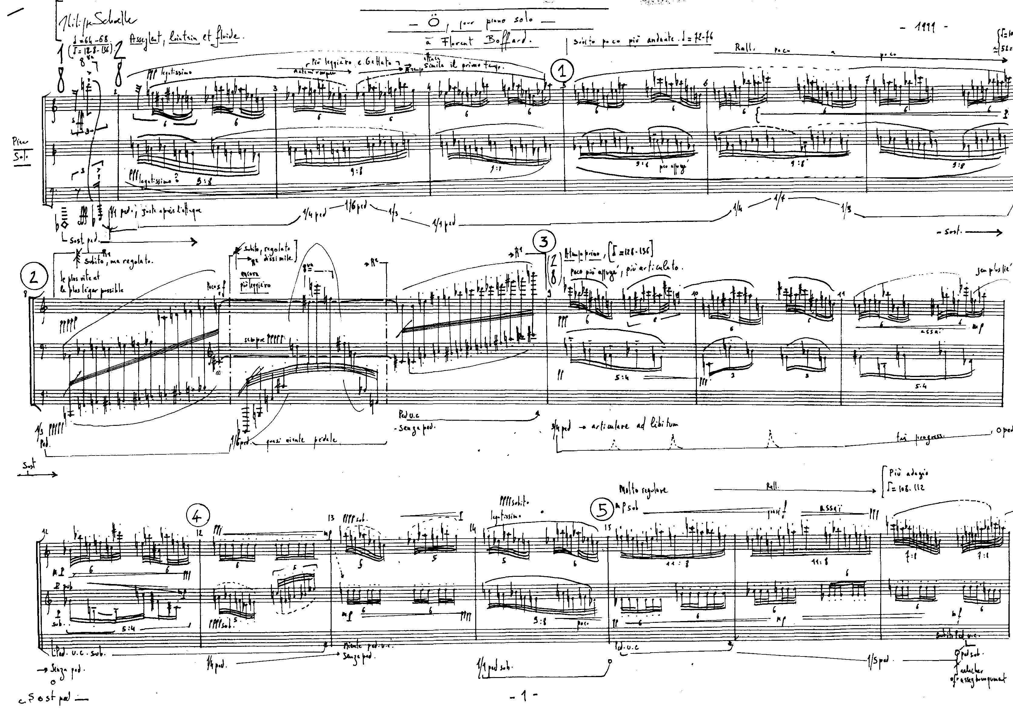 Première page manuscripte de " Ö" pour piano solo.